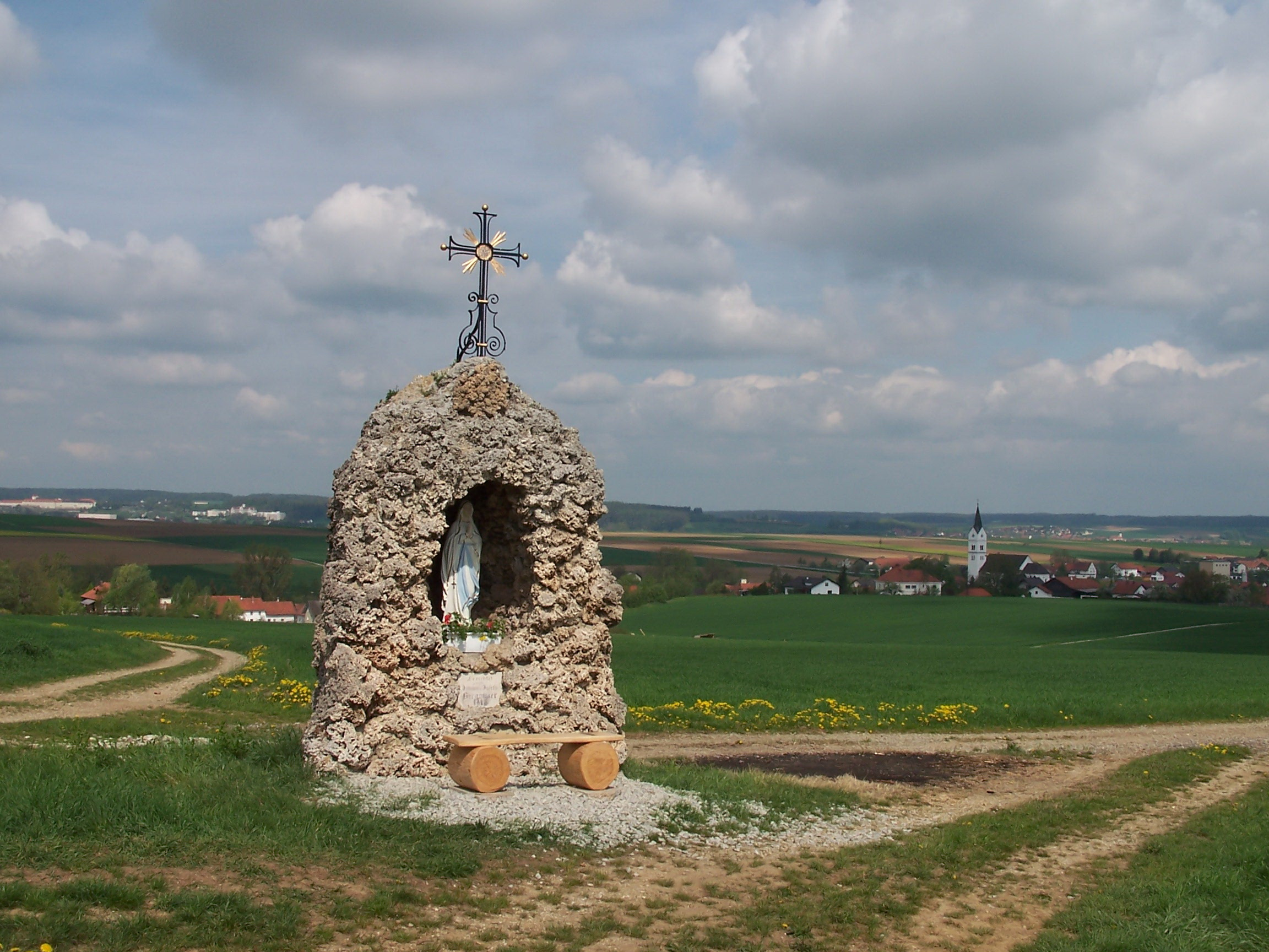 Lourdesgrotte aus dem Jahr 1915 auf freiem Feld östlich von Haimelkofen; nach dem Erbauer Bergmaiergrotte genannt.